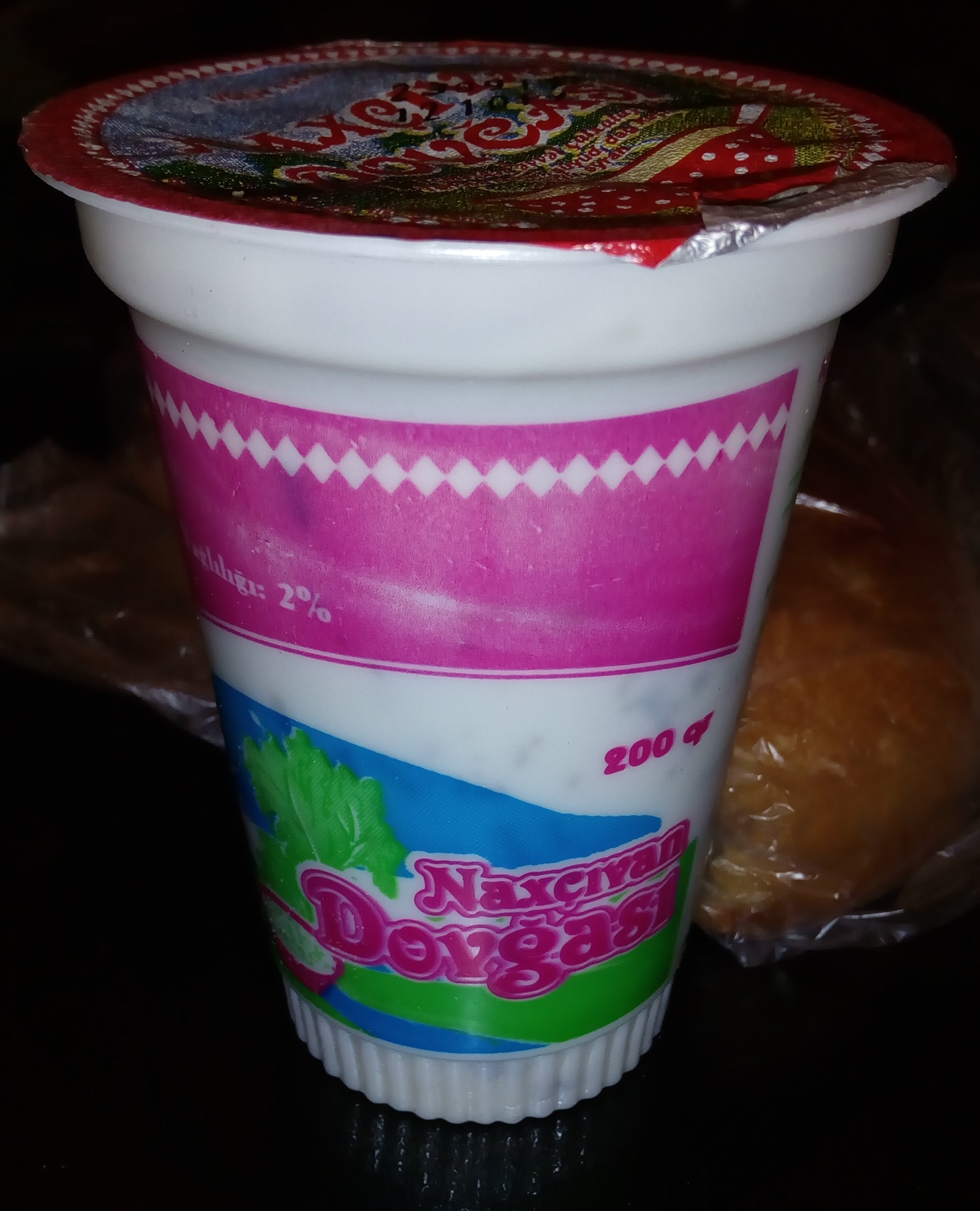 Naxçıvan dovğası